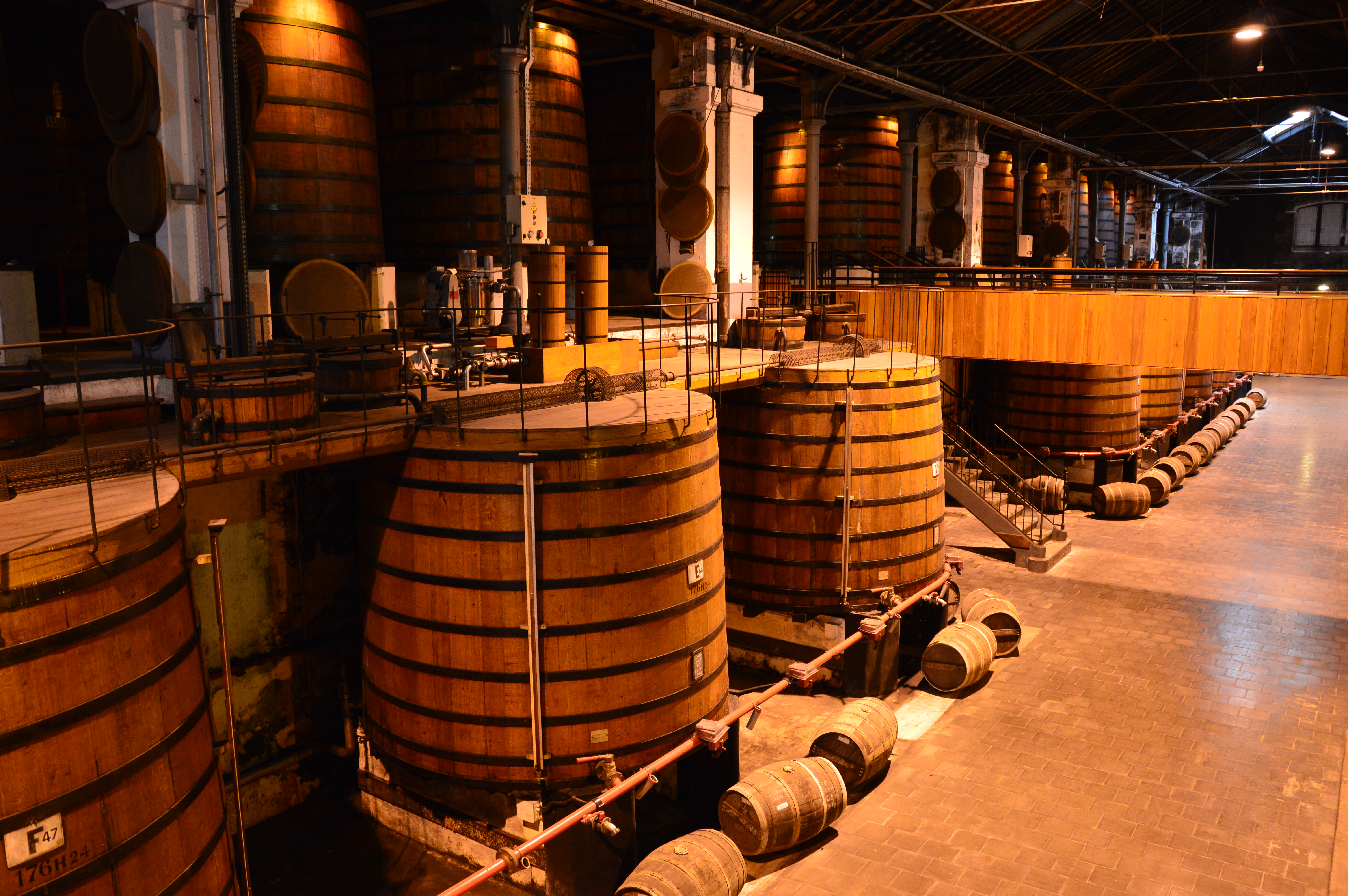 Martelli konjakimõis.